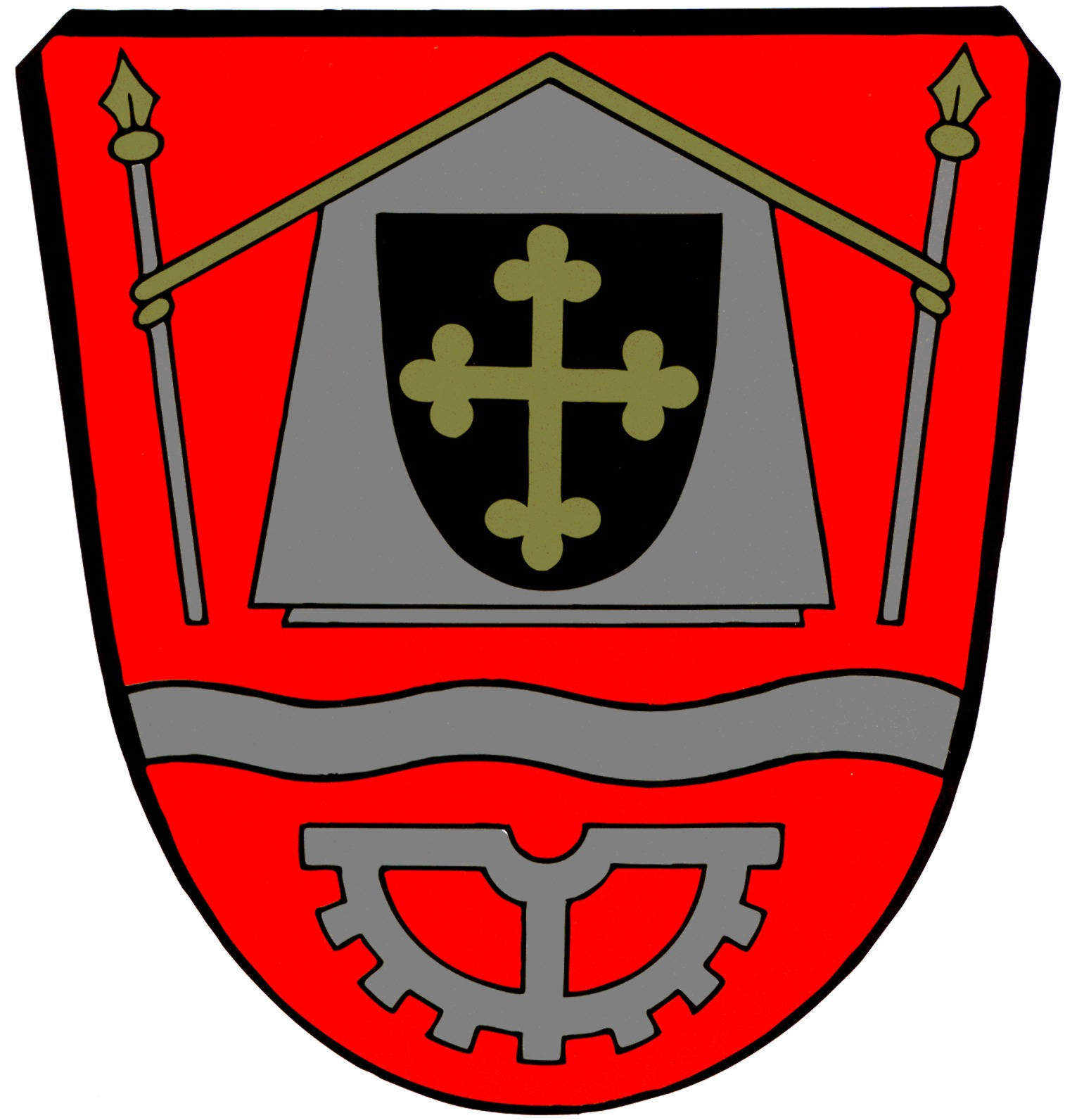 Wappenbeschreibung laut Genehmigung des Bayer. Staatsministerium "In Rot ein gesenkter silberner Wellenbalken; darüber ein silbernes Zelt mit zwei lanzenförmigen Stangen, belegt mit einem schwarzen Schild, darin ein goldenes Kleeblattkreuz; unten ein unterhalbes Zahnrad."